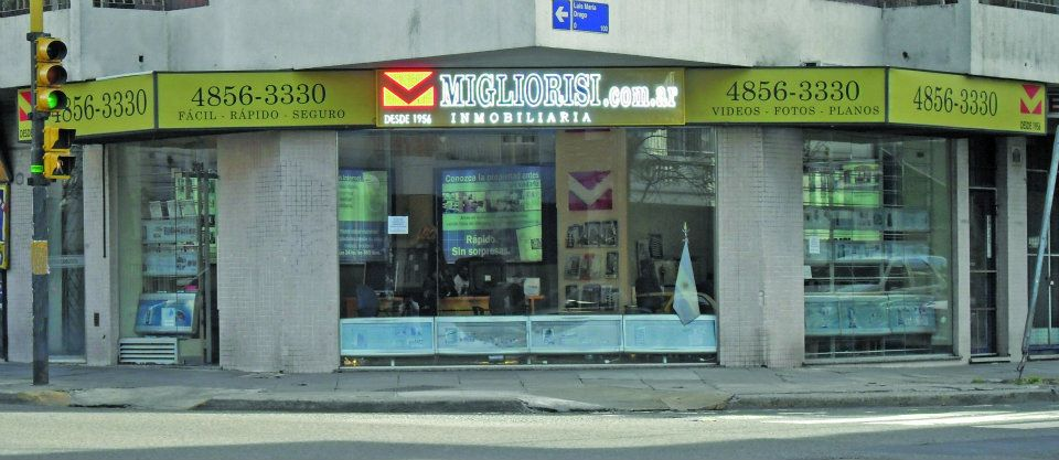 Angel Gallardo